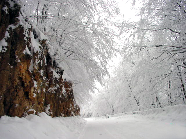 Motiv dimeri ne rrugen Brezovice- Prevalle.